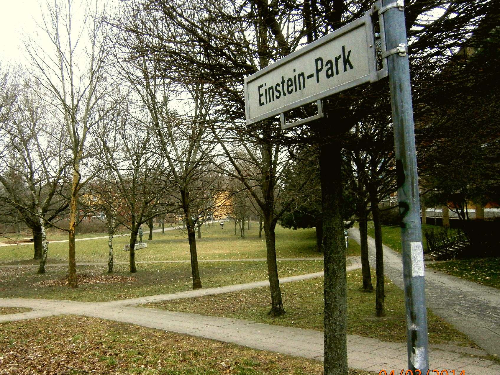 Der Hönower Weg ist einer der 20 grünen Hauptwege Berlins. Er führt vom Volkspark Friedrichshain zunächst durch den Bezirk Prenzlauer Berg. Er verläuft insbesondere zwischen Storkower Straße und Hanns-Eisler-Straße über den Pieskower Weg und durch den Einsteinpark. Im Bild die Markierung des Parksnamens am Pieskower Weg/ Einsteinstraße.